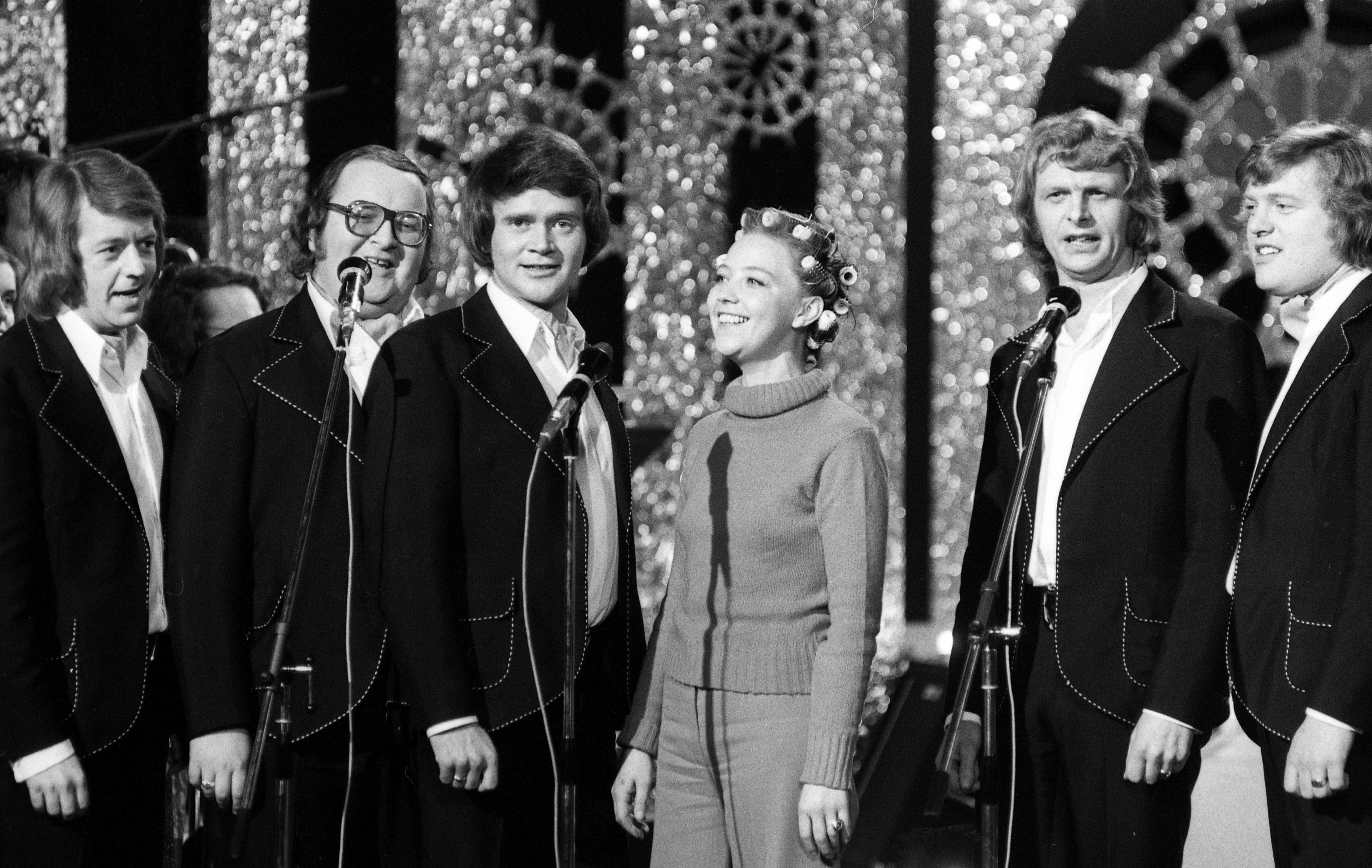 Melodi Grand Prix, norsk finale i TV-studio 1 NRK, 1974. Fra generalprøven. Foto: Petter R. Iversen. Arkivref.: PA-0797_U_7631_014_033